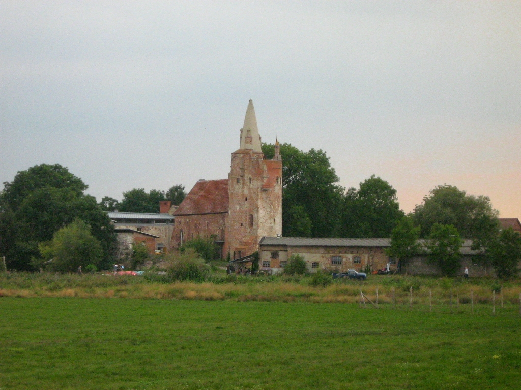 Blick von der Niederung der Tollense und des Großen Landgrabens auf die Burg Klempenow (Gemeinde Breest, Landkreis Demmin, Vorpommern).